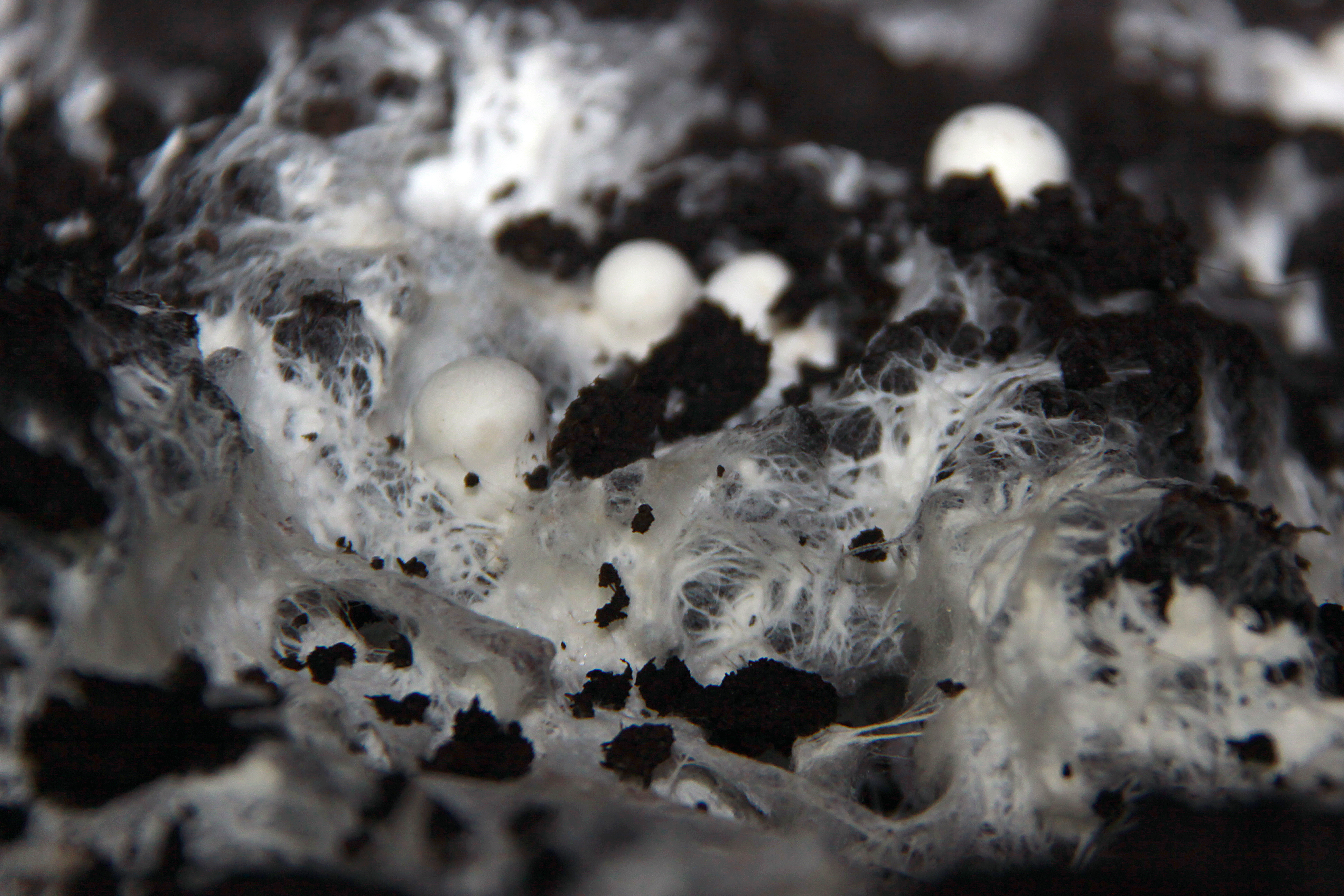 Micelio y carpóforos de champiñón en cultivos de Pradejón (La Rioja), localidad líder en el cultivo de champiñón y setas en España.